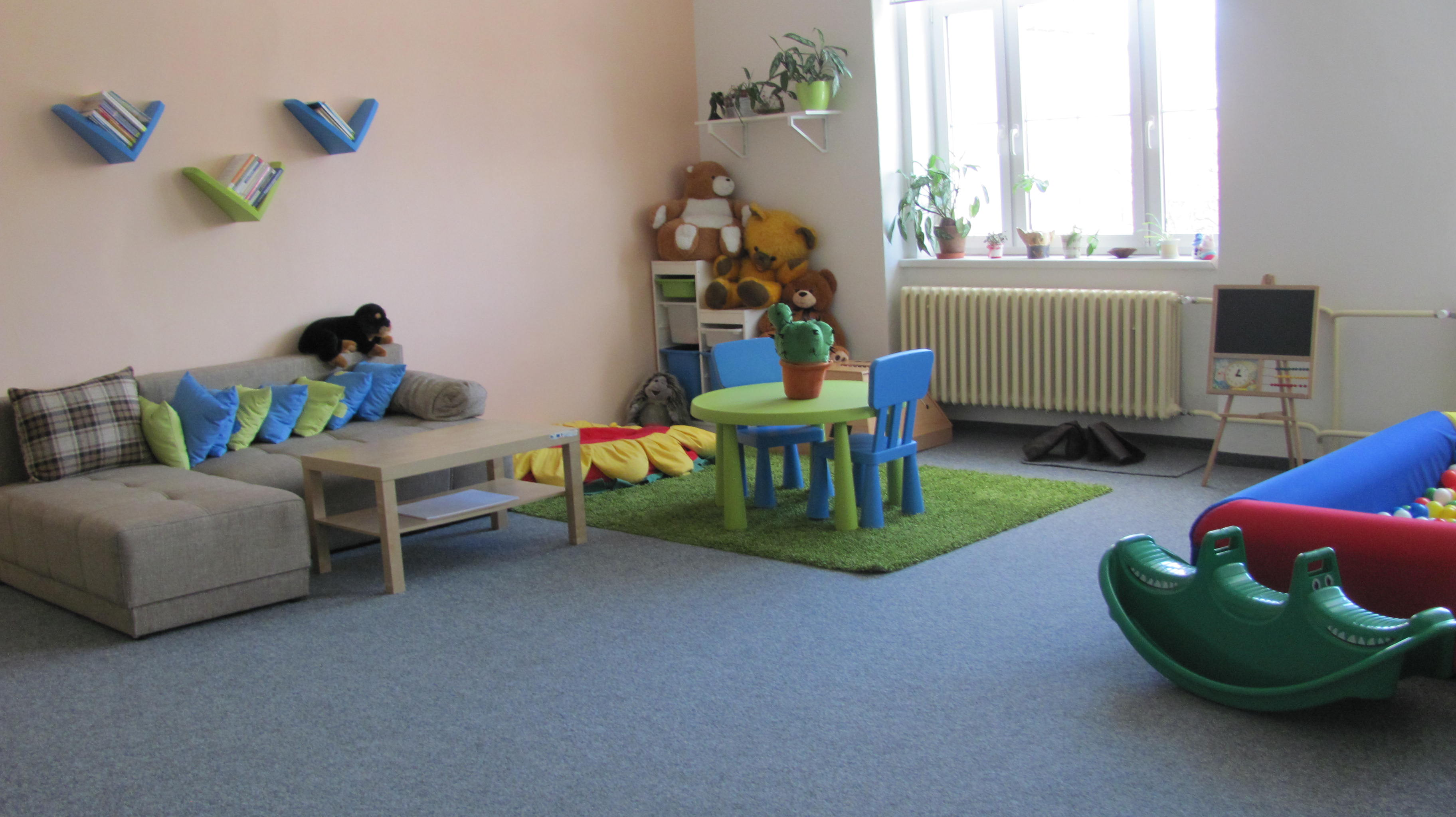 Herna, společenská místnost